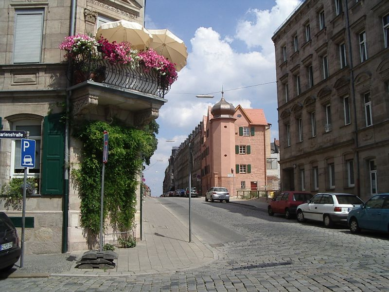 Fürth, Lochnersches Gartenhaus in der Theaterstraße, von SSW fotografiert, Das Lochnersche Gartenhaus wurde um 1700 errichtet; der Turm wohl von 1750 (dat.). 2004 durchgreifend saniert. Links Balkonbegrünung mit Geranien und zwei Sonnenschirme. Vgl. Gartenhaus von SO